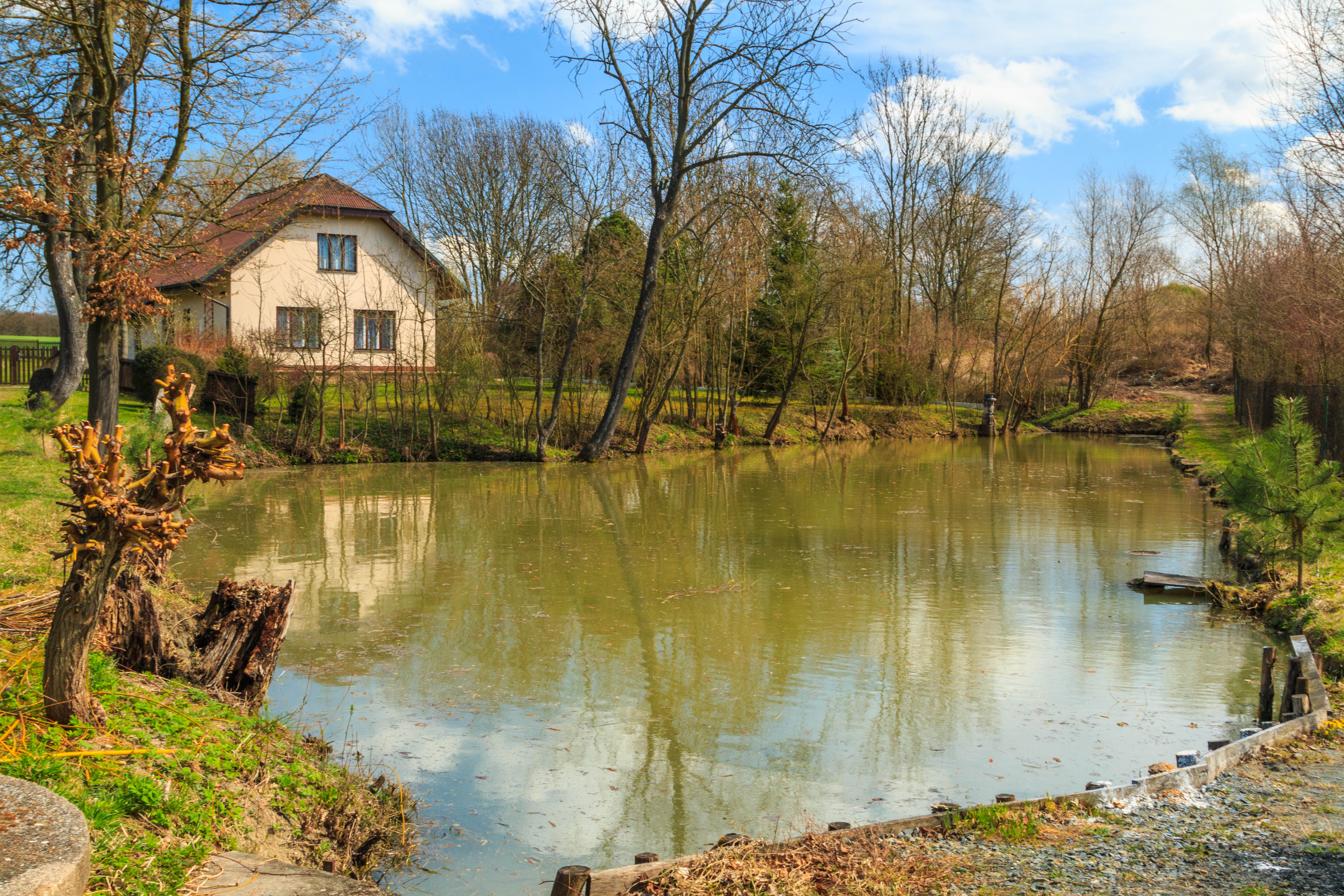 Rybníčky u Barchůvku Project: Vodstvo.